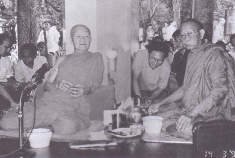 หลวงตามหาบัว หลวงปู่บุญเพ็ง